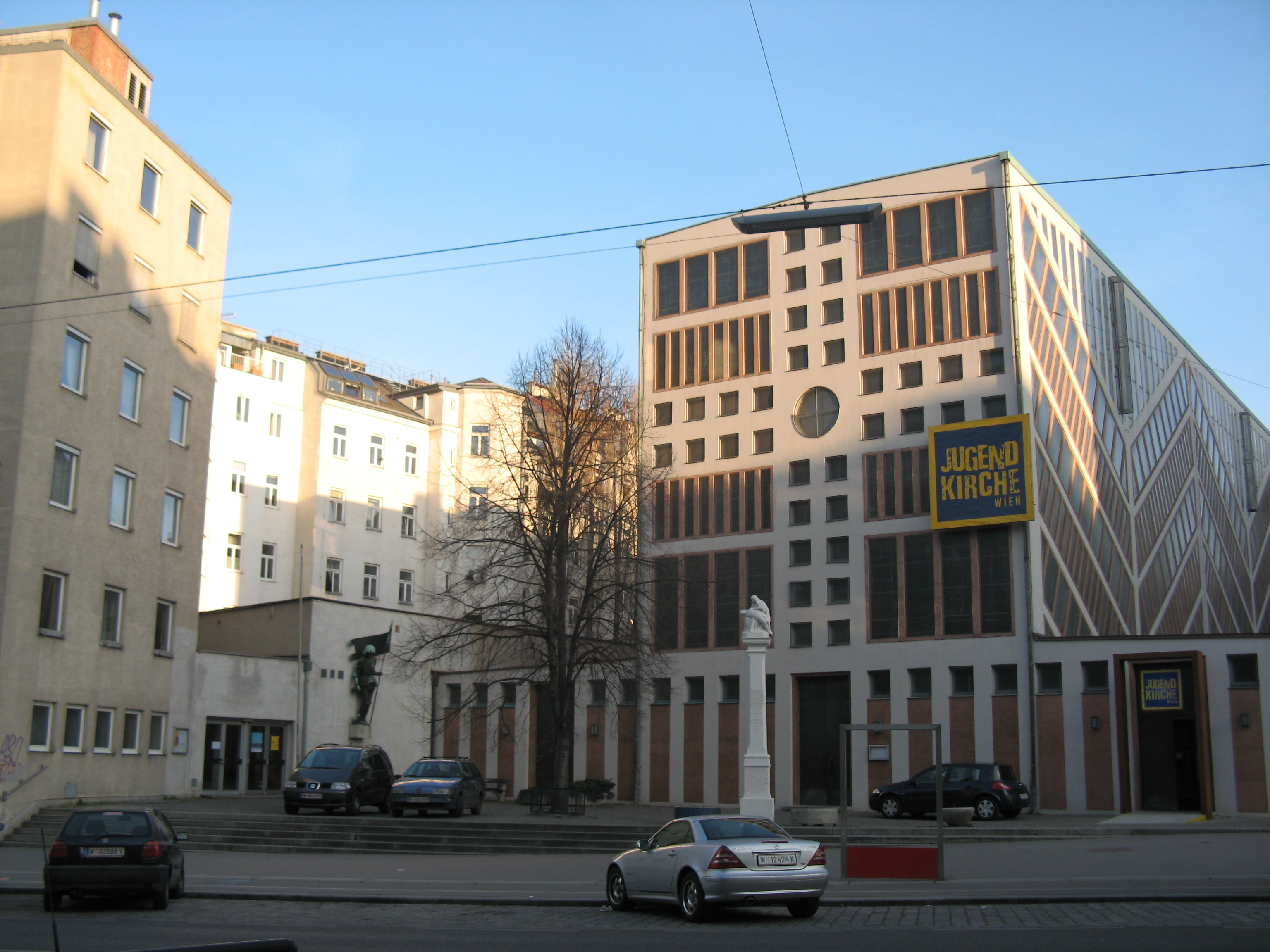 Matzleinsdorfer Pfarrkirche Hl. Florian (1961-63) von Rudolf Schwarz, Wiedner Hauptstraße 97, Wien-Margareten